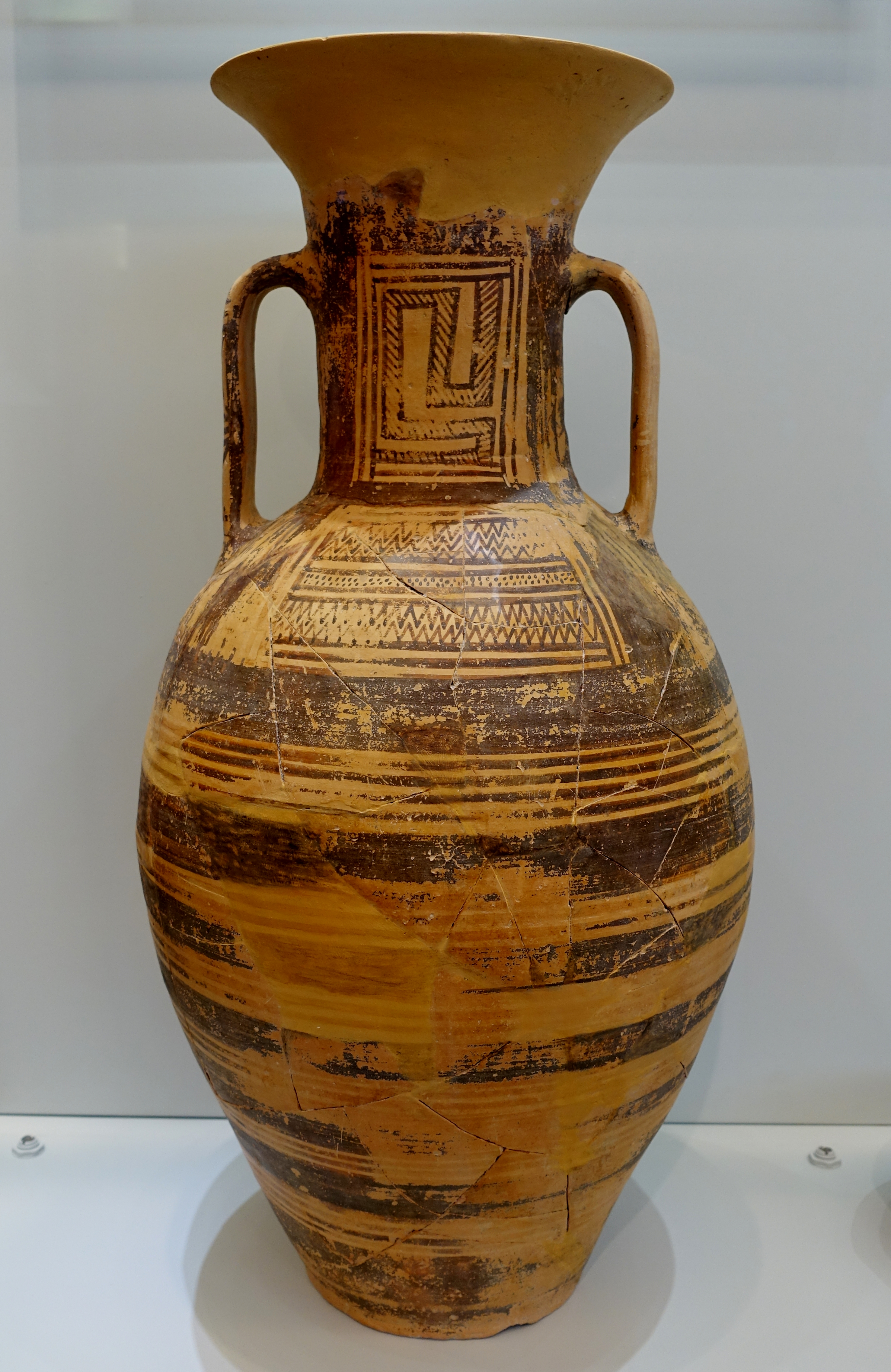 Amphore mit geometrischem Dekor aus Vrokastro (Βρόκαστρο, geometrische Periode 8. Jahrhundert v. Chr.), Archäologisches Museum Iraklio, Kreta, Griechenland